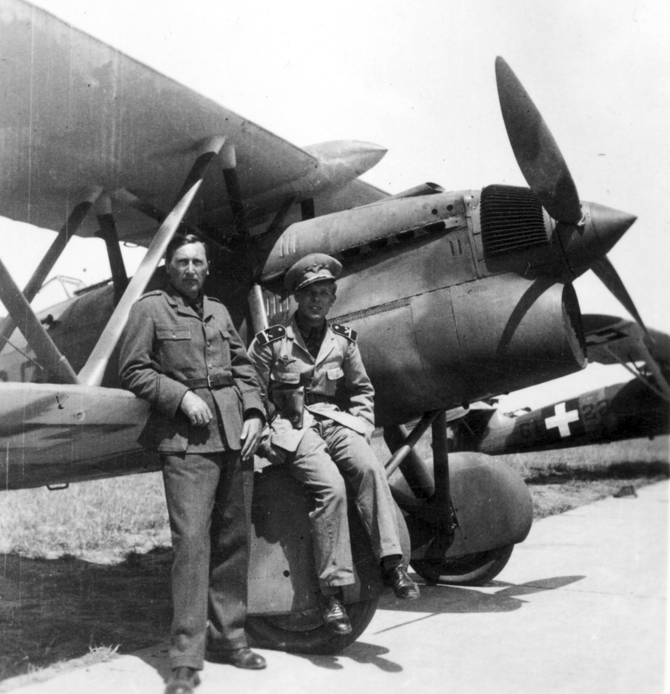 Fiat CR-32 Falco vadászrepülőgép. Tags: Royal Hungarian Air Force, airplane, military, pilot, Fiat-brand, Italian brand Title: Fiat CR-32 Falco vadászrepülőgép.